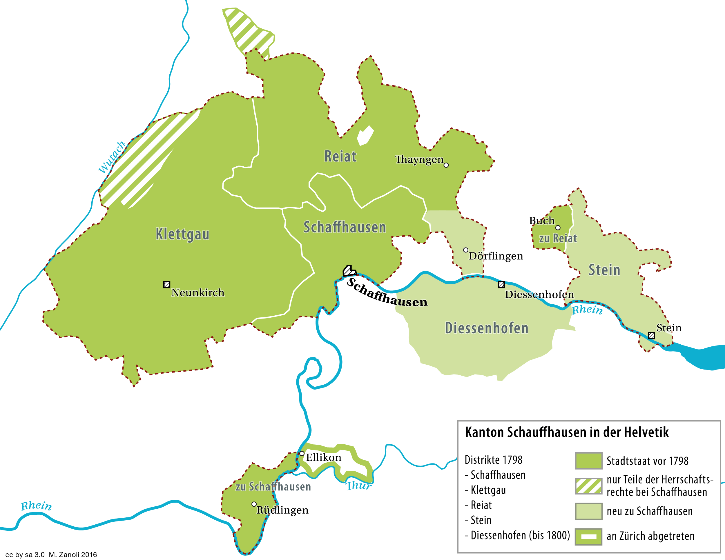 Karte des Kantons Schaffhausen zur Zeit der Helvetischen Republik 1798-1803